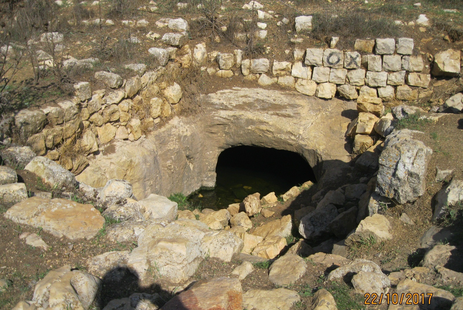 Bak Ruins